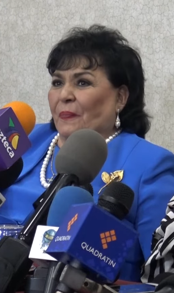 ¿Carmen Salinas es amiga de los papás de Donald Trump? regañan a Edith González x enseñar calzones